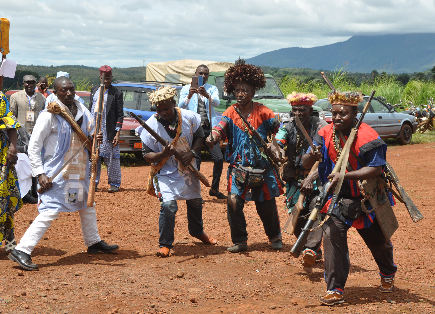 Danse traditionnelle dans le village de Njiyit (Foumban), département du Noun, région de l'Ouest au Cameroun This is an image of Cultural Fashion or Adornment from Cameroon